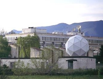 Scuola Superiore Guglielmo Reiss Romoli: antenne